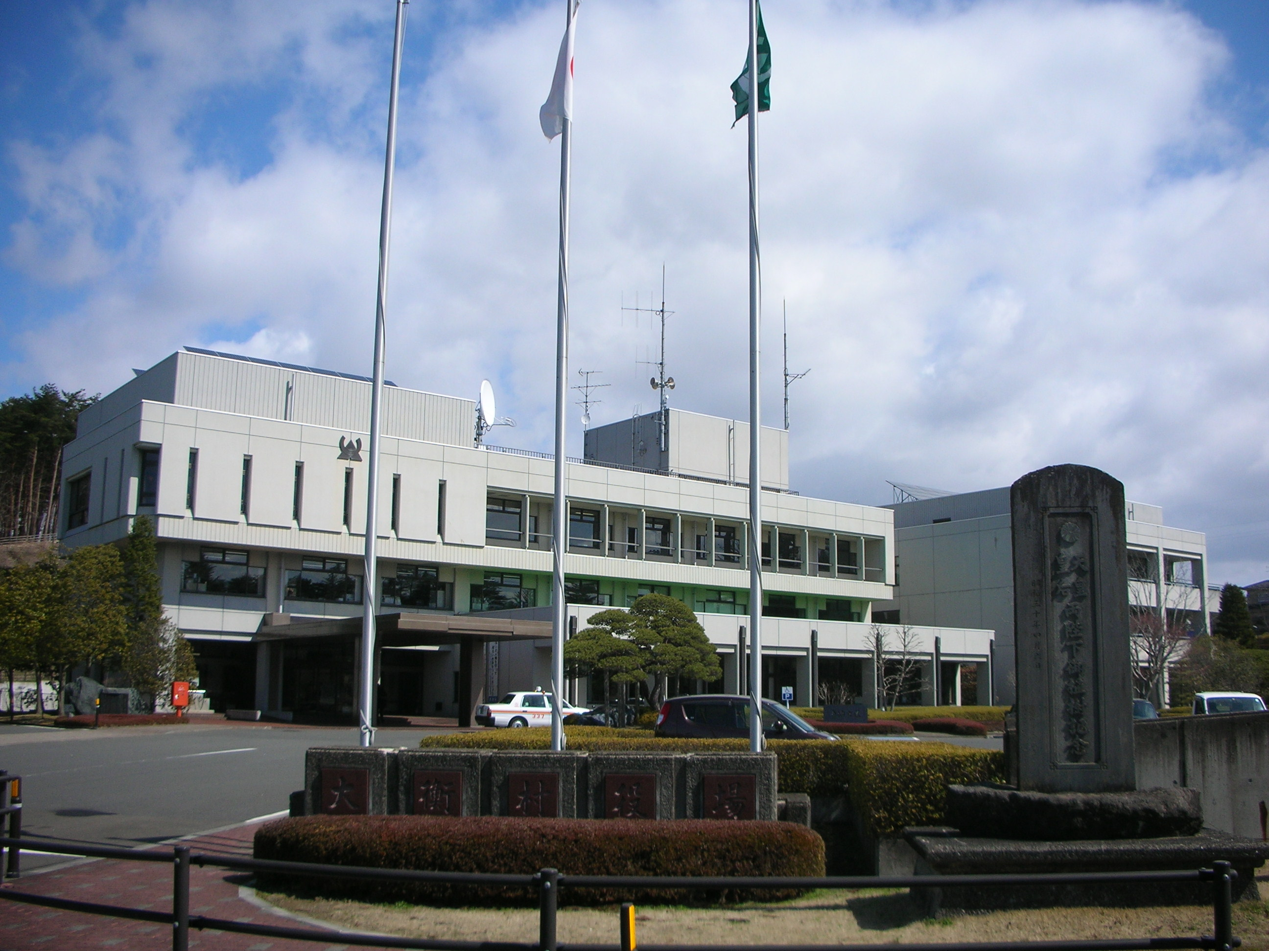 大衡村役場